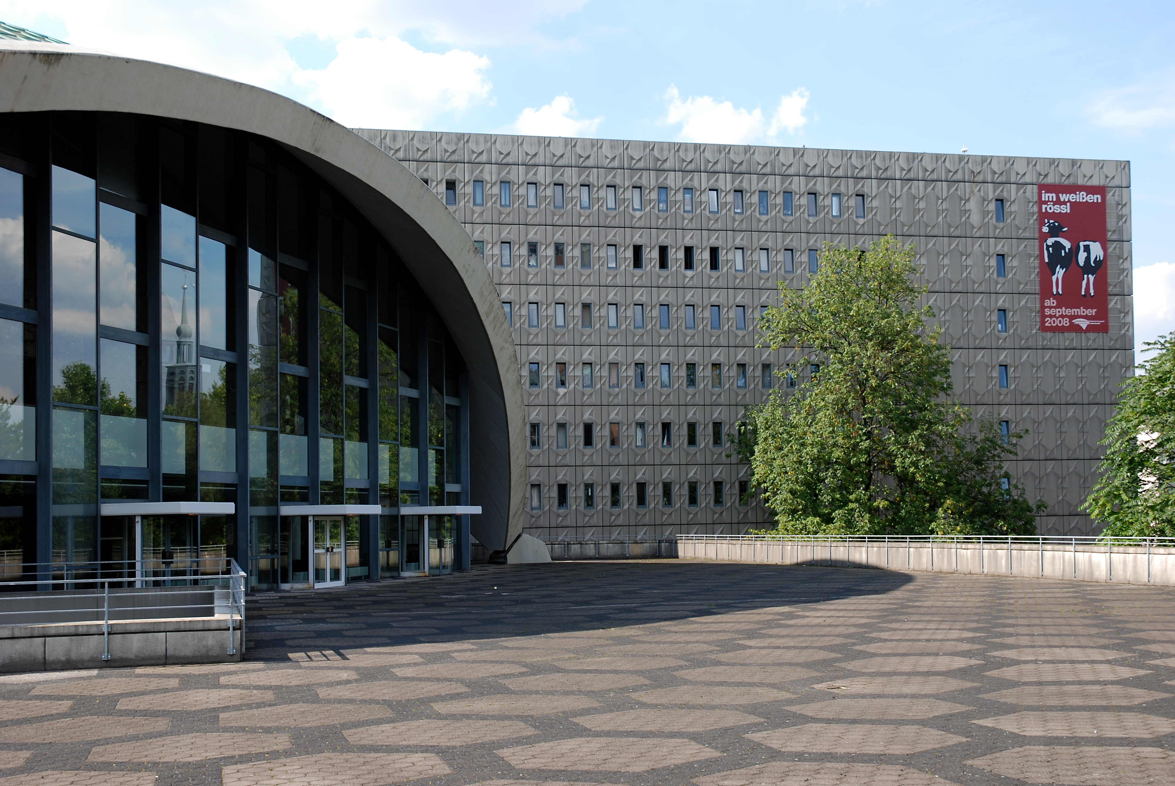 Dortmund, Städtische Bühnen, Stadttheater, Oper, Betonkuppel über Zuschauerraum, nördliche Stütze